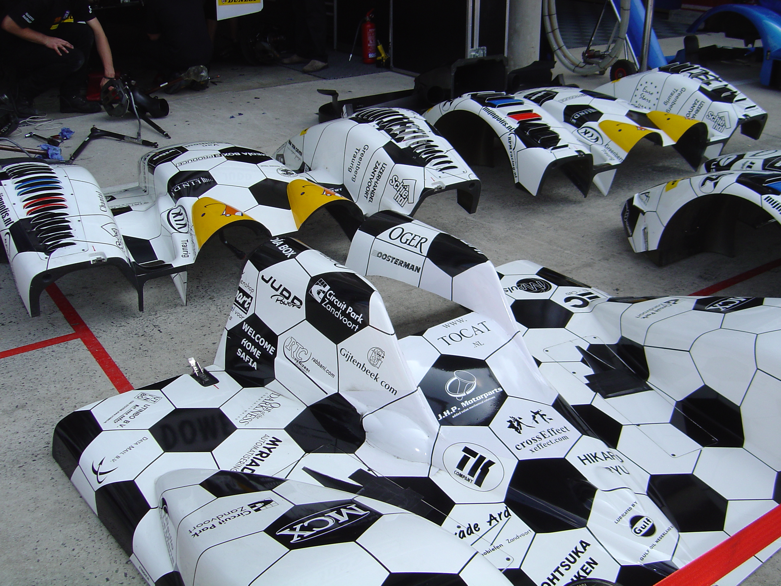 Les capots de la S101 aux 24 Heures du Mans 2006